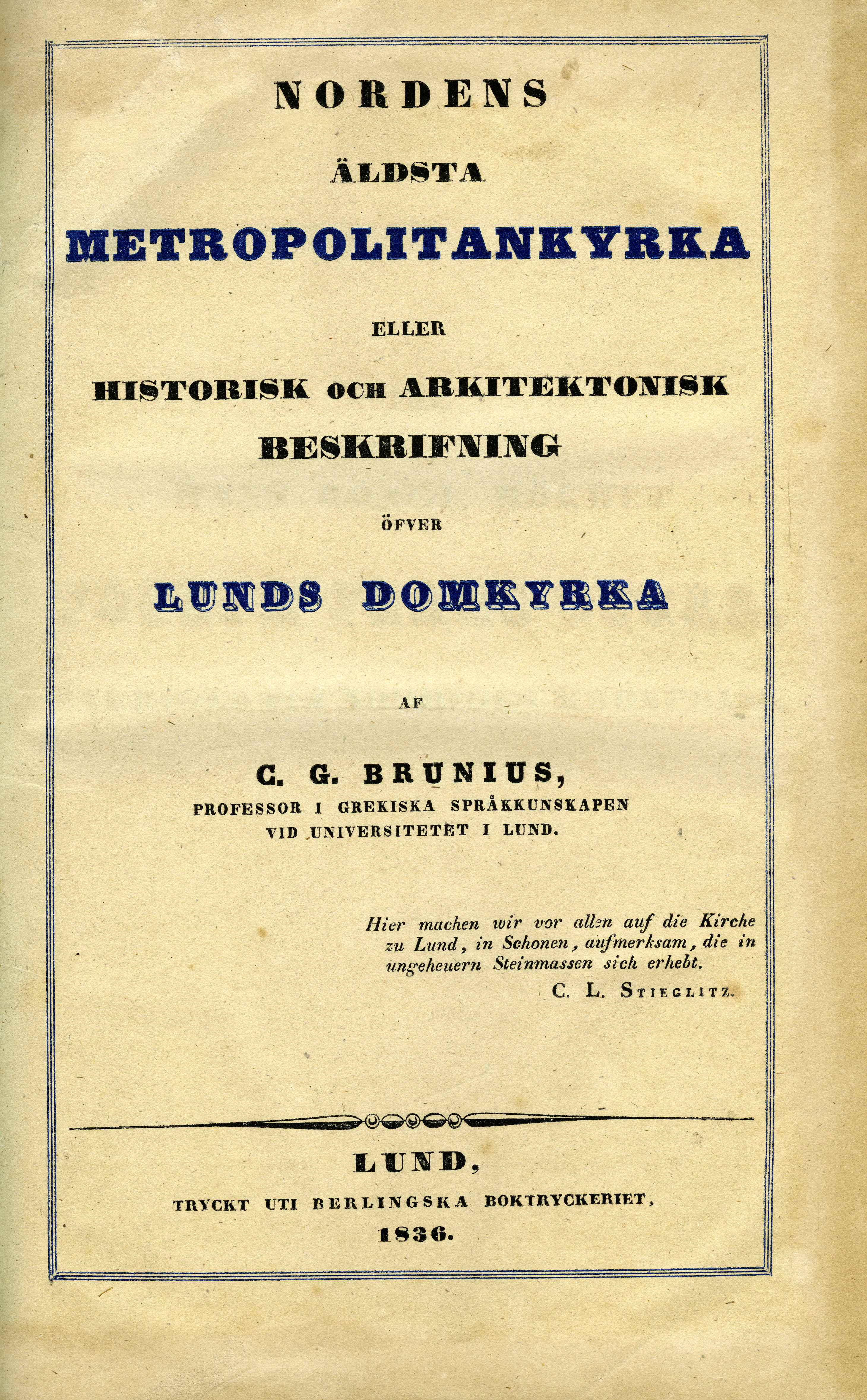 Titelblad för boken Nordens äldsta metropolitankyrka eller Historisk och arkitektonisk beskrifning öfver Lunds domkyrka (1836) av C. G. Brunius. Tryckt i Lund 1836. Första upplagan.